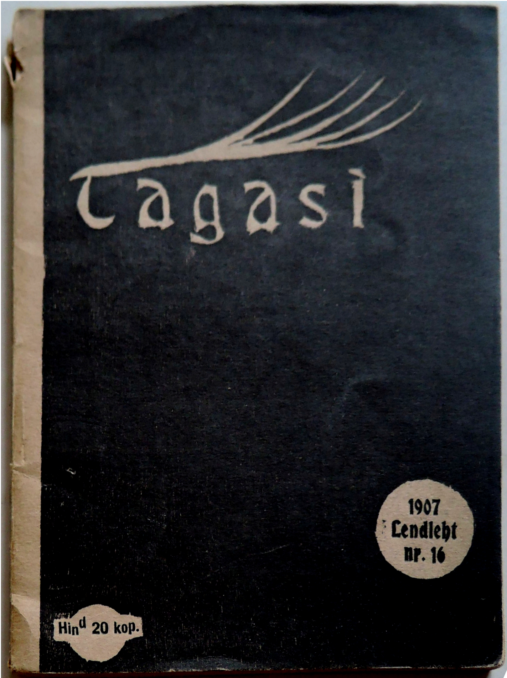 Lendleht nr 16 Tagasi 1907 esikaas